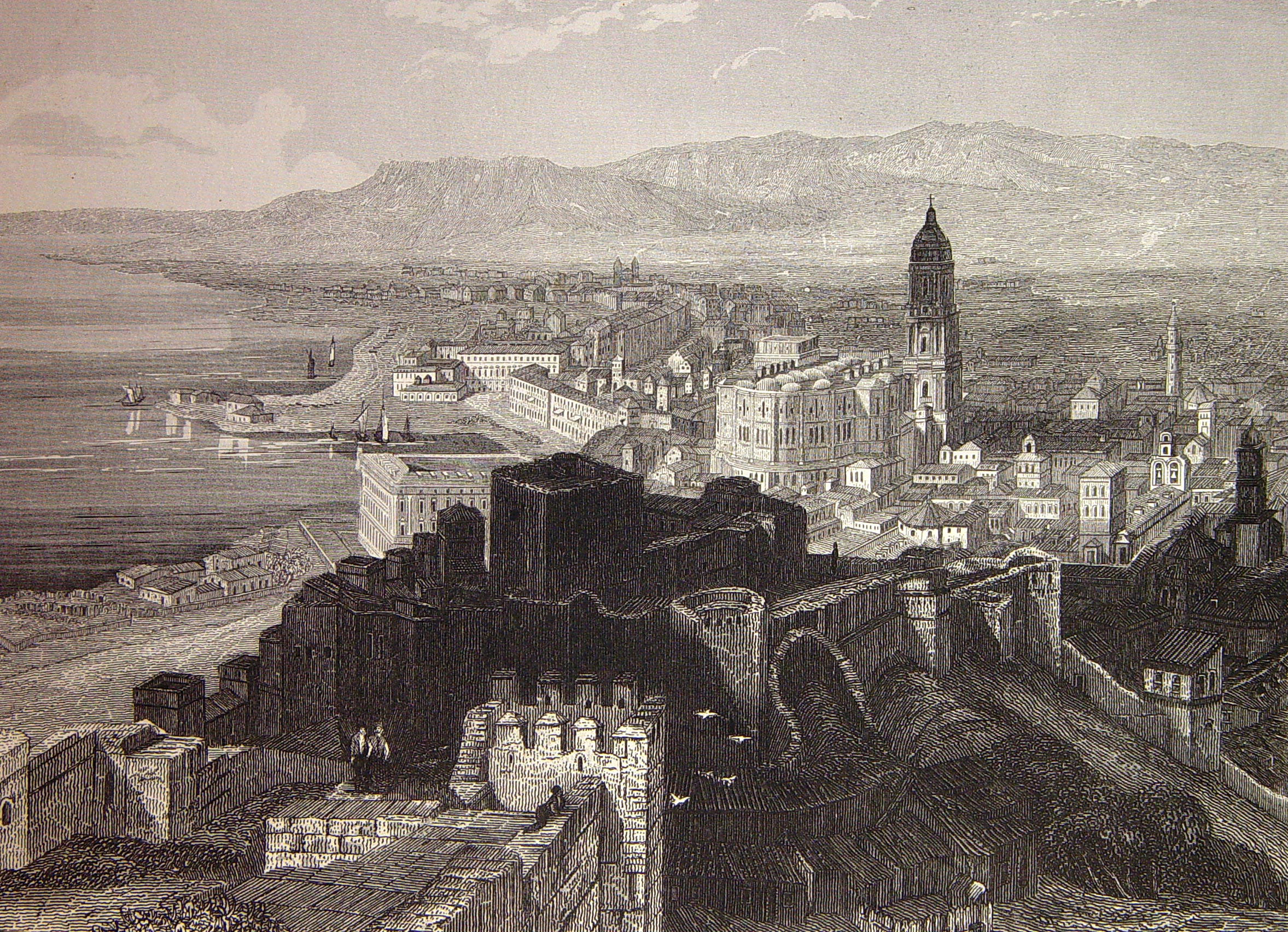 "Málaga". Ilustraciones pertenecientes al libro: Las glorias nacionales : grande historia universal de todos los reinos, provincias, islas y colonias de la Monarquía Española, desde los tiempos primitivos hasta el año de 1852. - Madrid [etc.] (Barcelona : Imprenta de Luis Tasso) Librería de la Publicidad [etc.], 1852-1854.